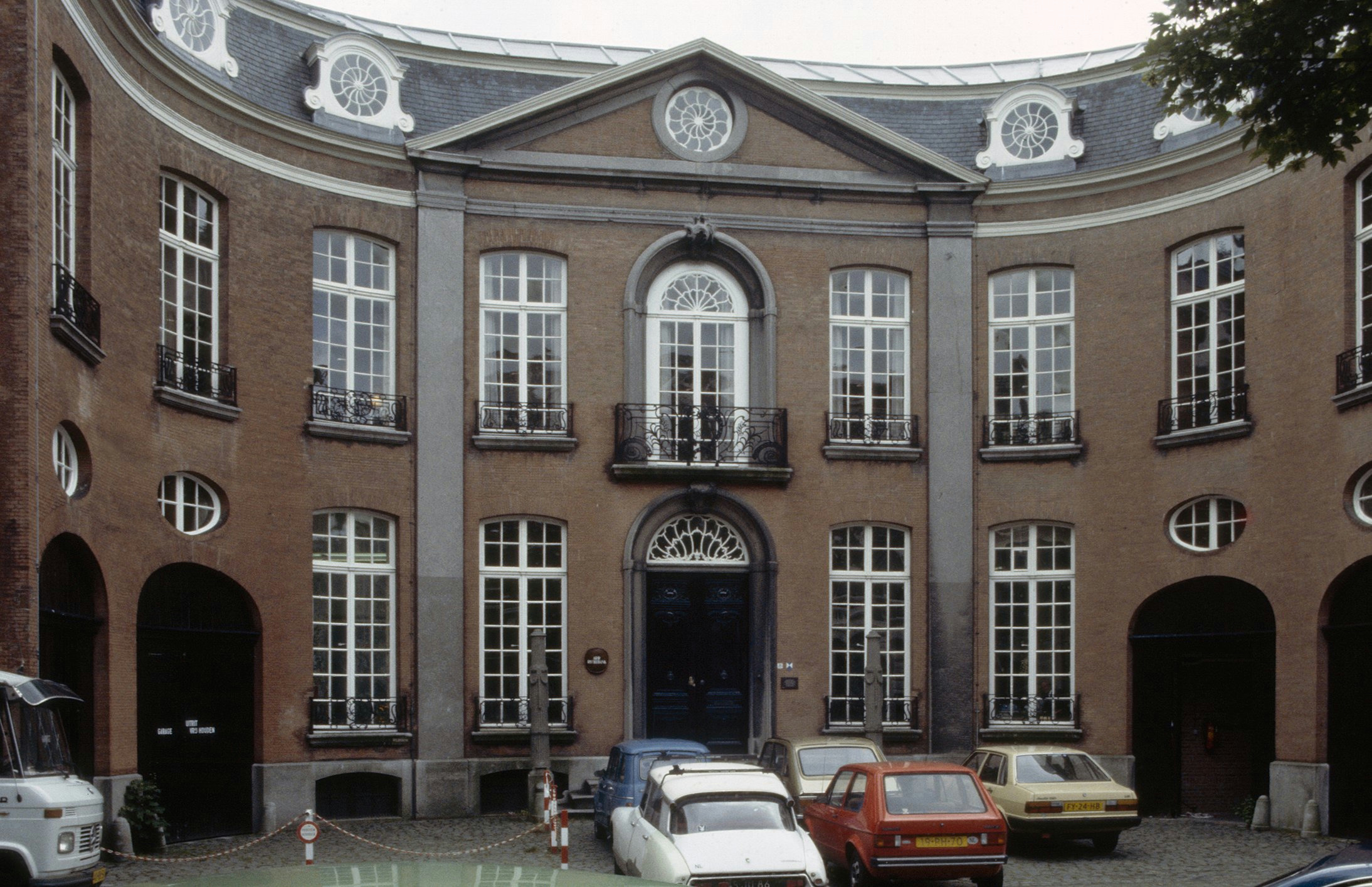 Van De Perrehuis: Exterieur VOORGEVEL